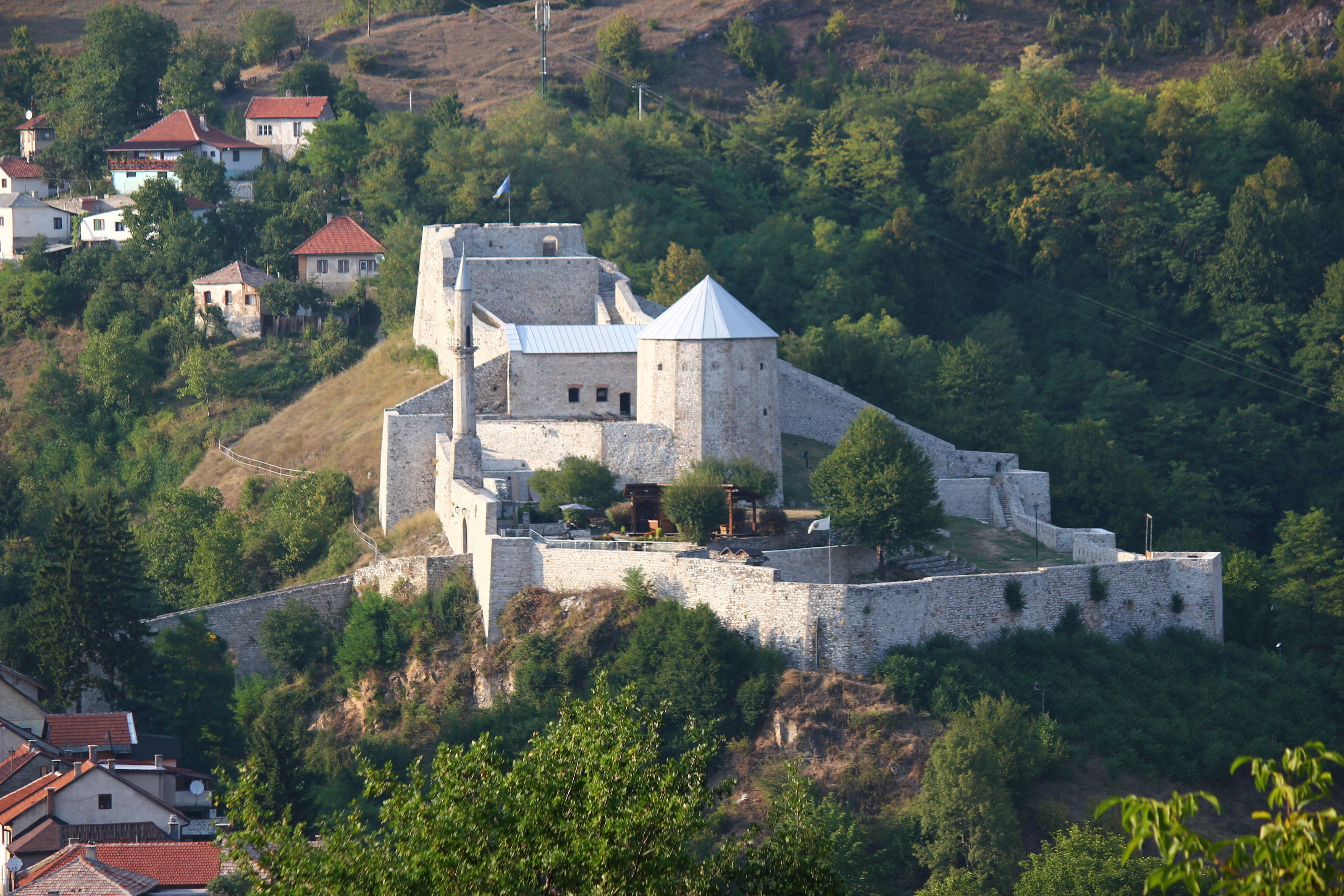 Die Festung von Travnik.